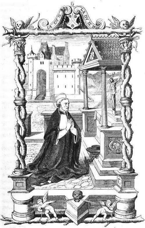 "Portrait du cardinal Sanguin, d'après une miniature de la collection de M. Ambroise-Firmin Didot. Dessin de M. Gaucherel, gravure de M. Boëtzel". D'après le Livre d'Heures du cardinal Sanguin, Italie, XVIe siècle.